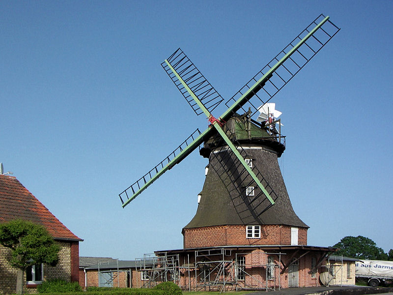 arbeitsfähige Galerieholländermühle in Dabel